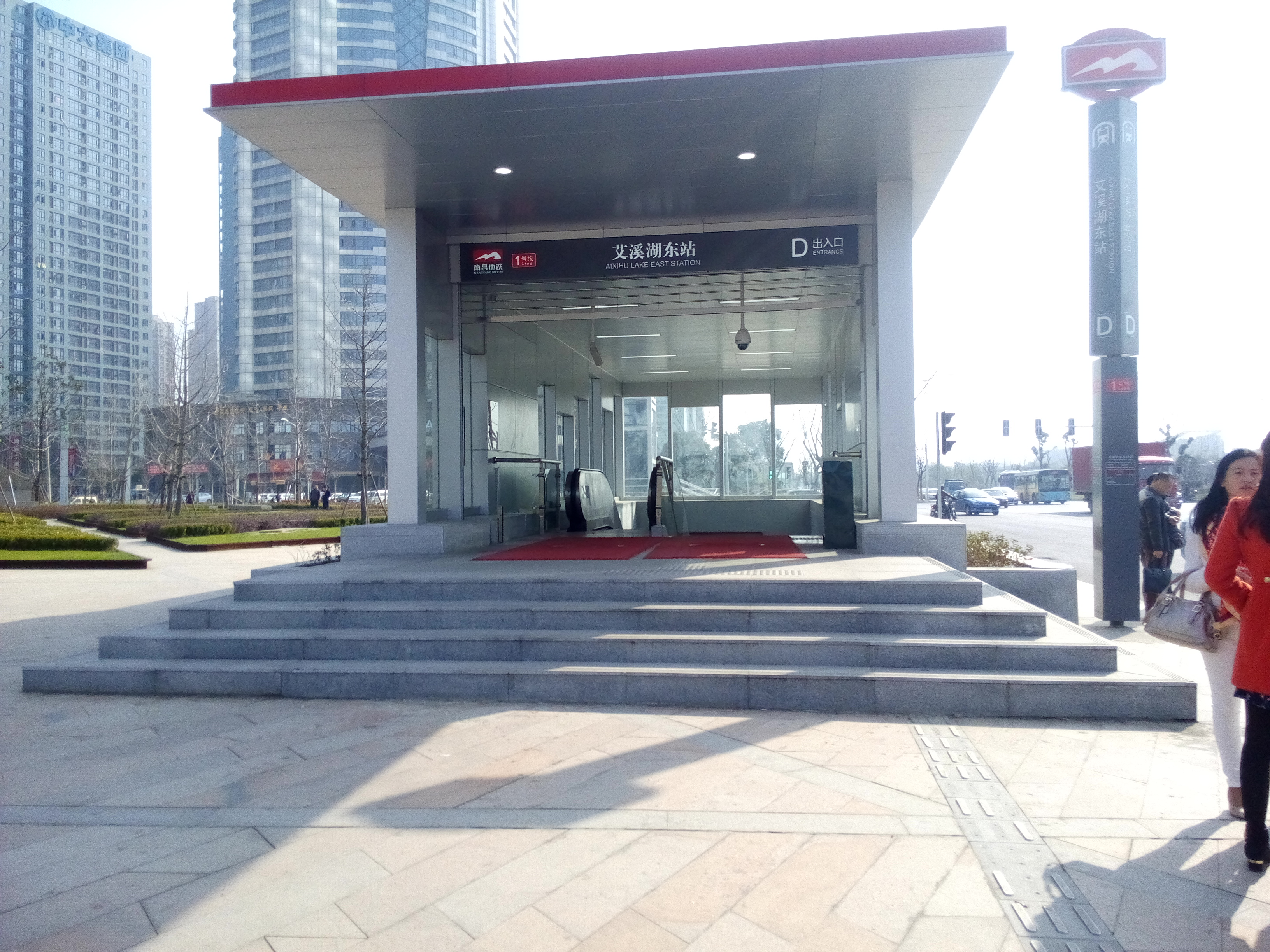 艾溪湖站D出入口